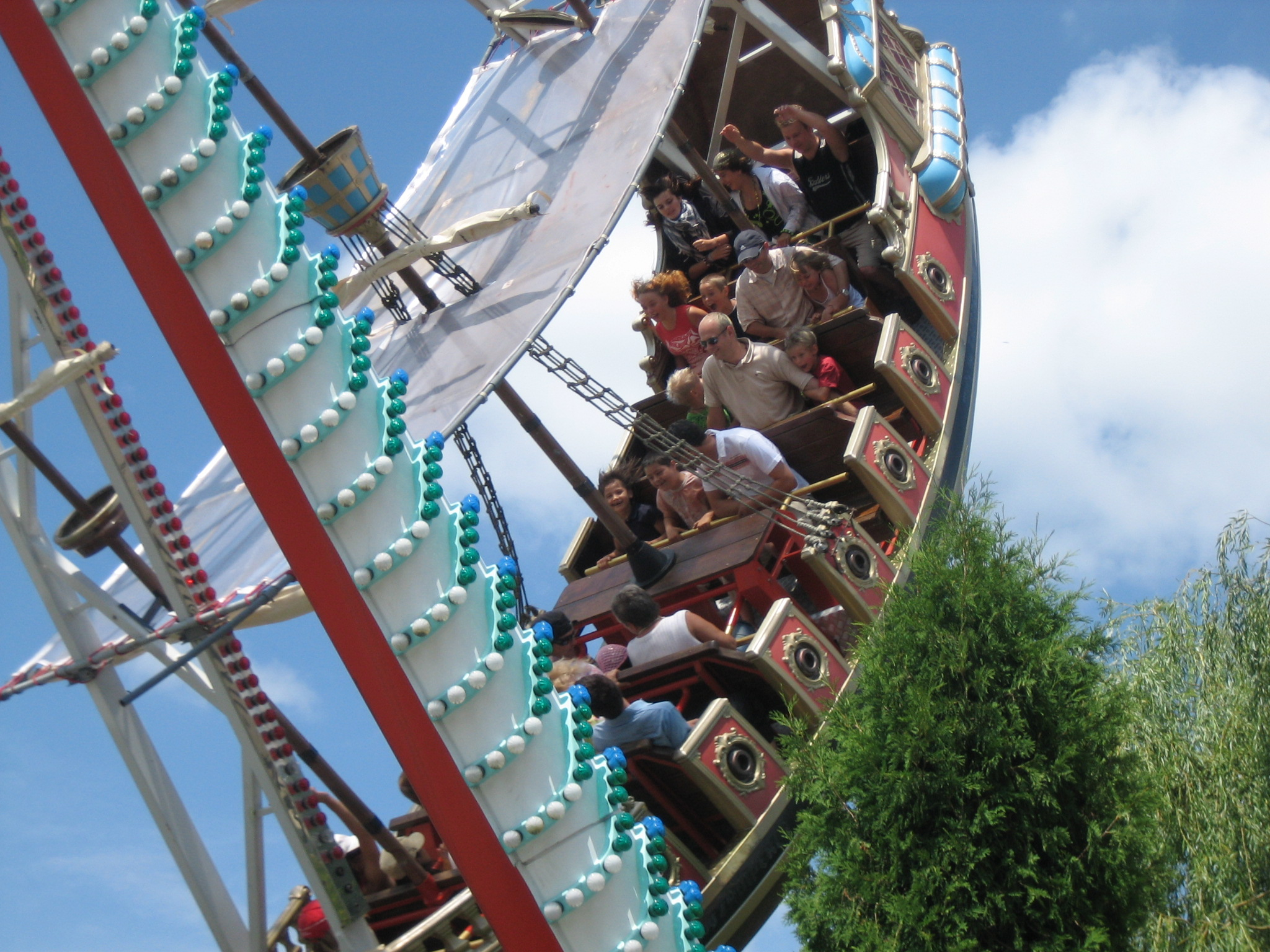 Schiffschaukel im Connyland, Lipperswil, Schweiz